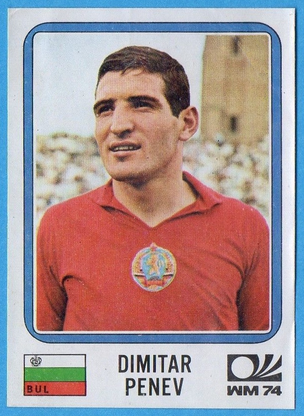 MONACO/MUNCHEN 74-PANINI-Figurina n.254- PENEV - BULGARIA -Recuperata